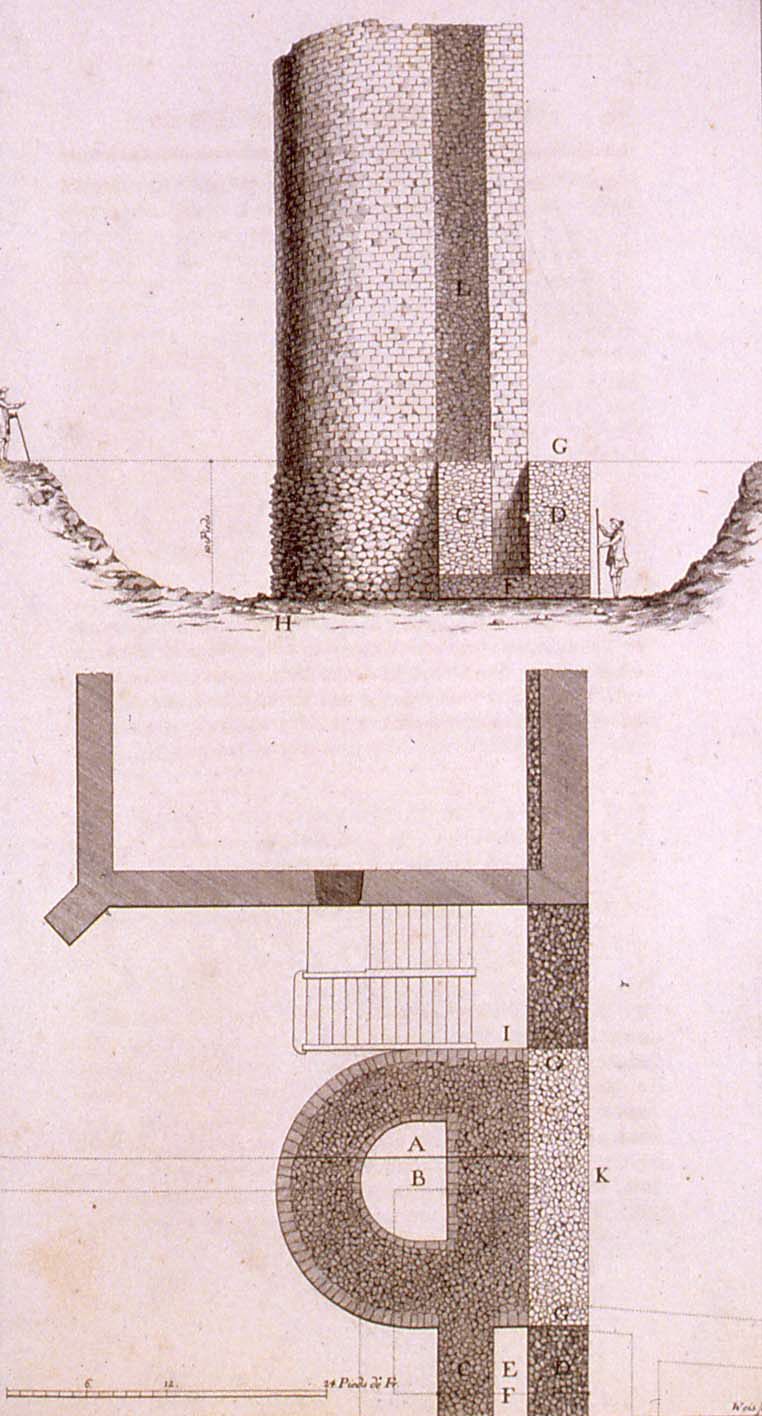 Schéma d’une tour d’enceinte de Strasbourg de l’époque romaine.